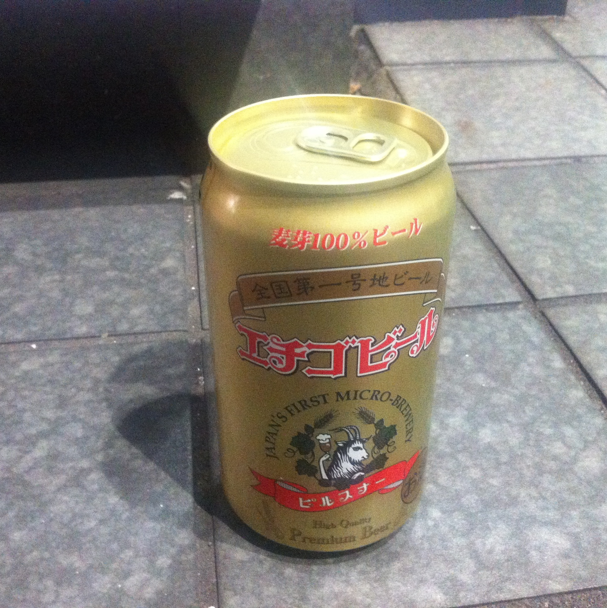 エチゴビール缶 (can of Echigo beer)